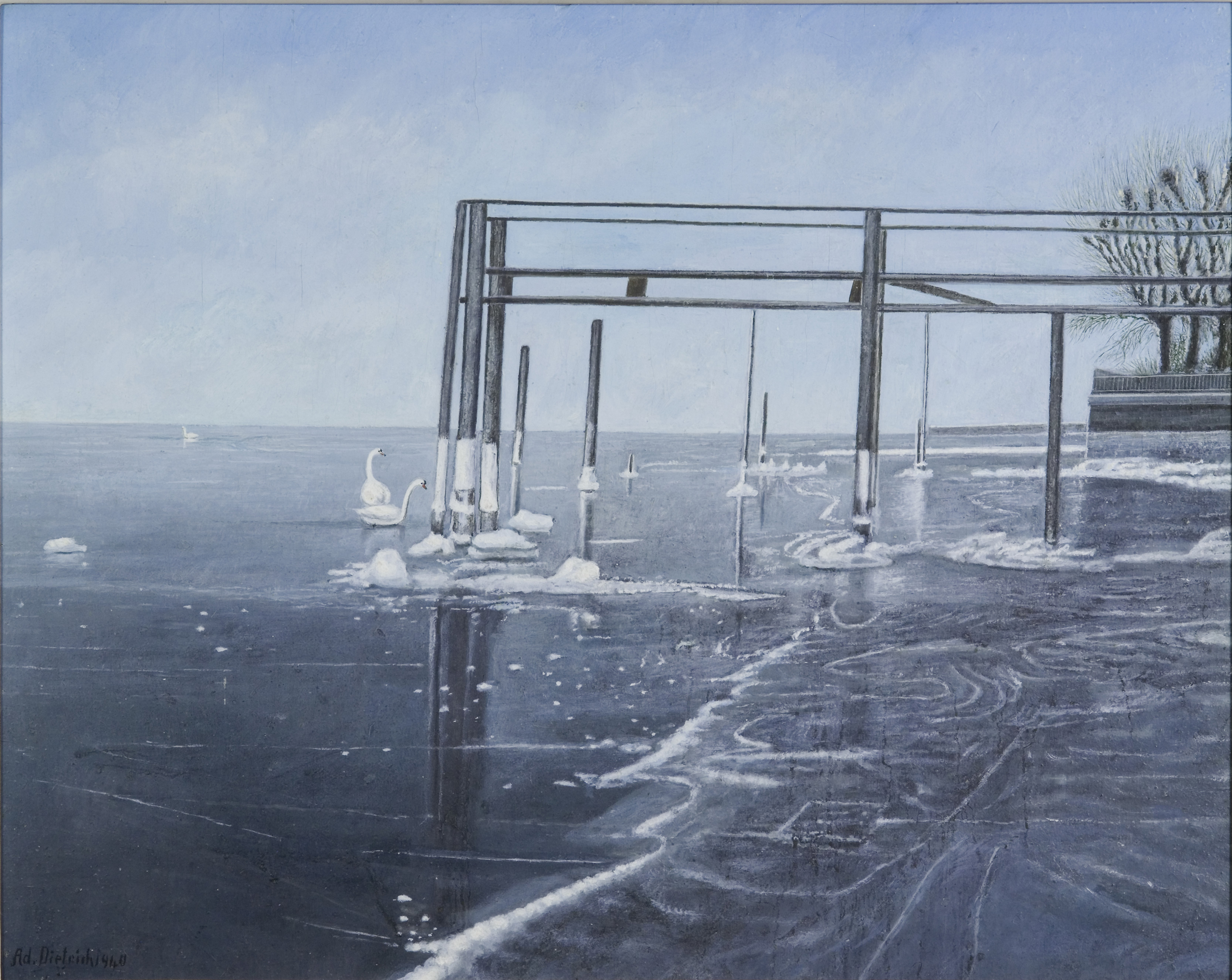 Gemälde aus dem Künstlernachlass im Kunstmuseum Thurgau, Kartause Ittingen